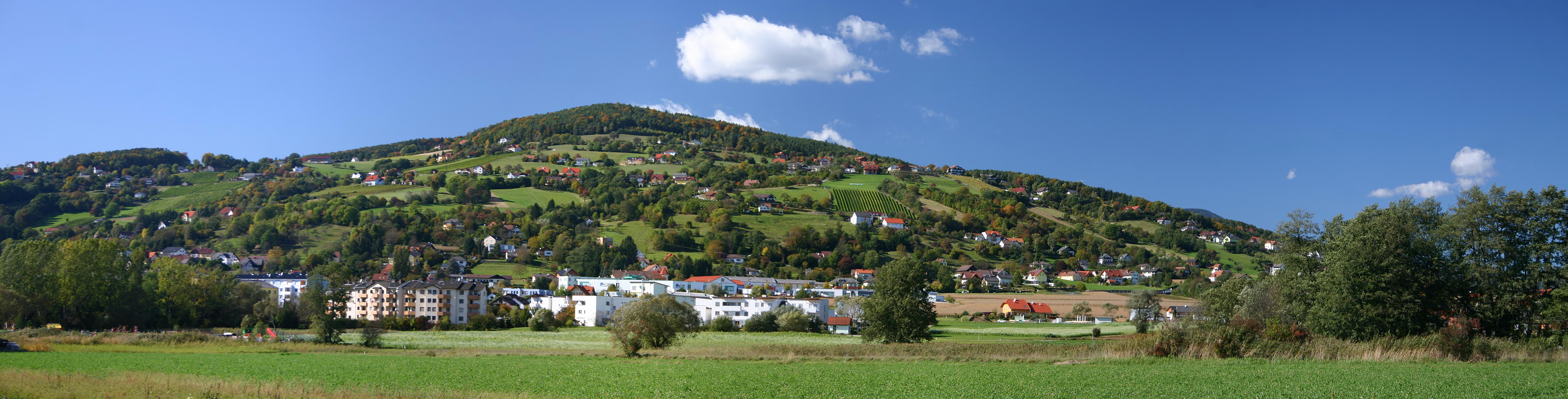 Hartberg, Panorama gegen Norden (zusammengesetzt mit „autostitch“ aus 4 Einzelbildern)